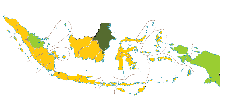 Provinsi-provinsi Indonesia menurut tingkatan PDRB per kapitanya Tinggi ($12.196 ke atas) Menengah ke atas ($3.946–12.195) Menengah ke bawah ($996–3.945)